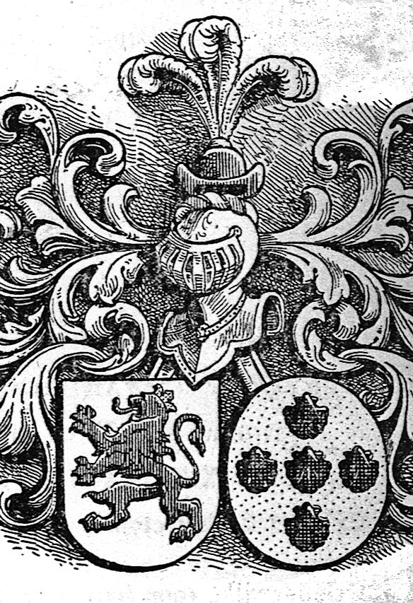 Praenobilis Familia